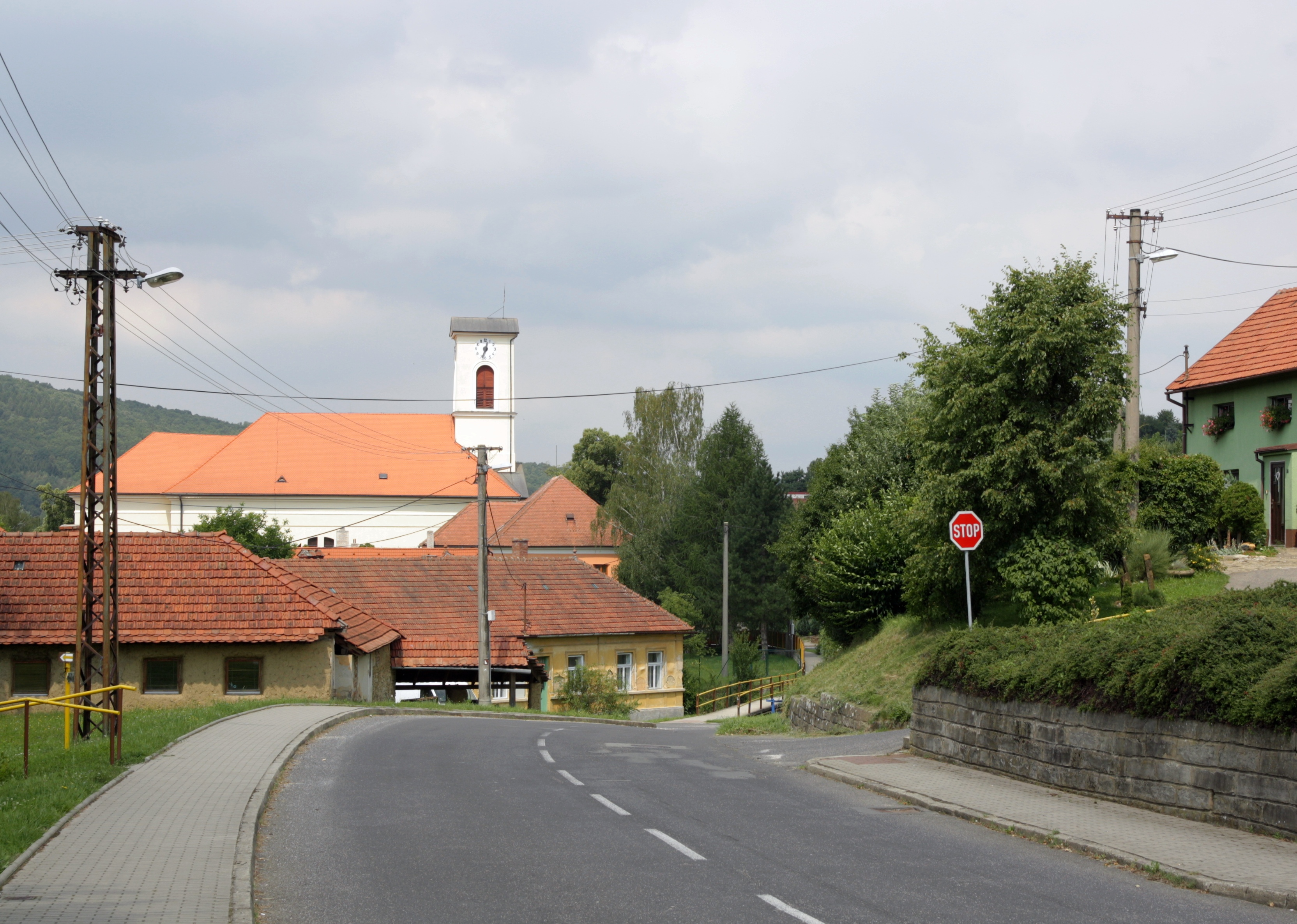 Komňa - hlavní ulice, centrum obce